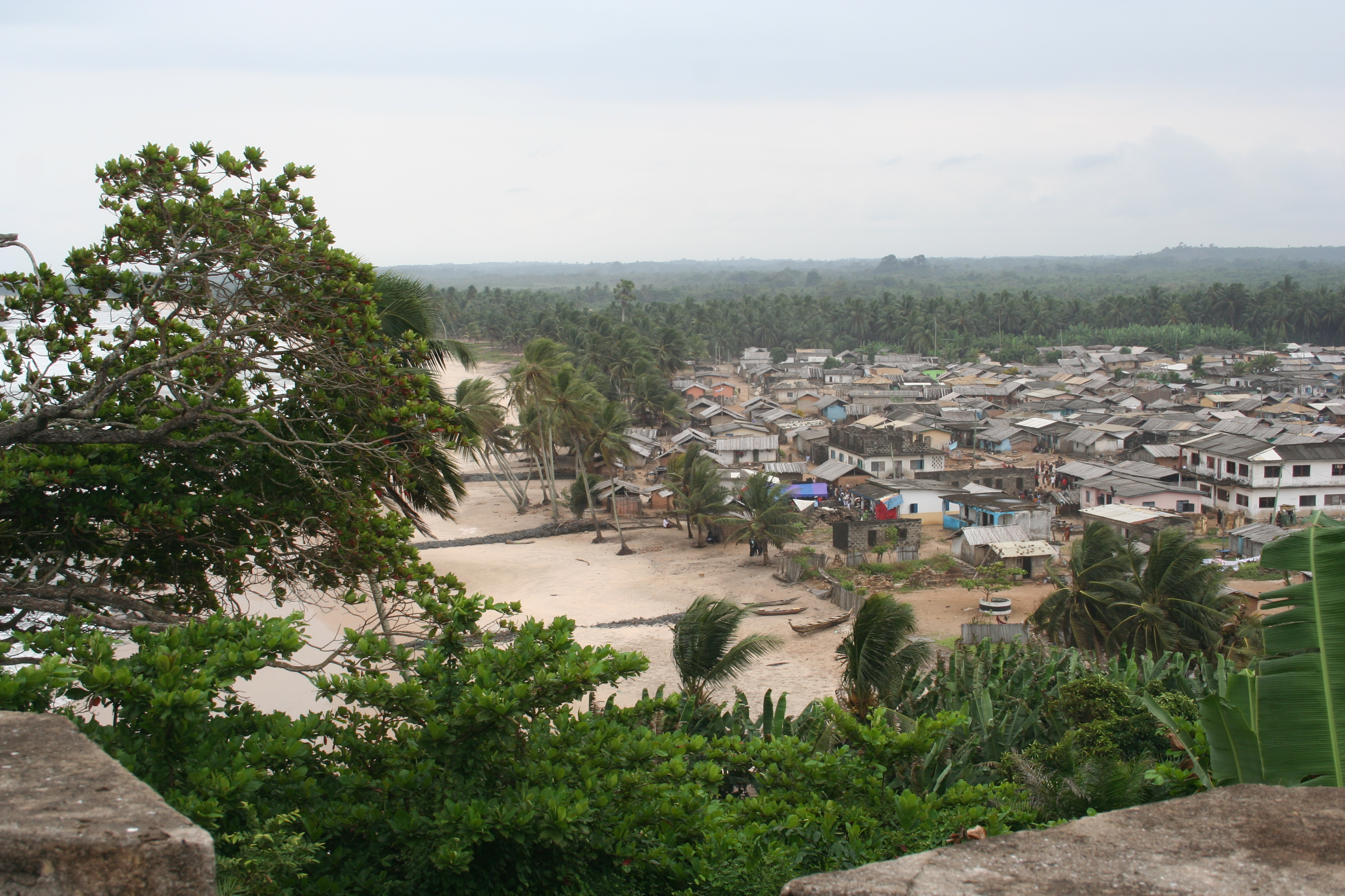 Blick vom Fort Groß Friedrichsburg auf den Ort Princess Town